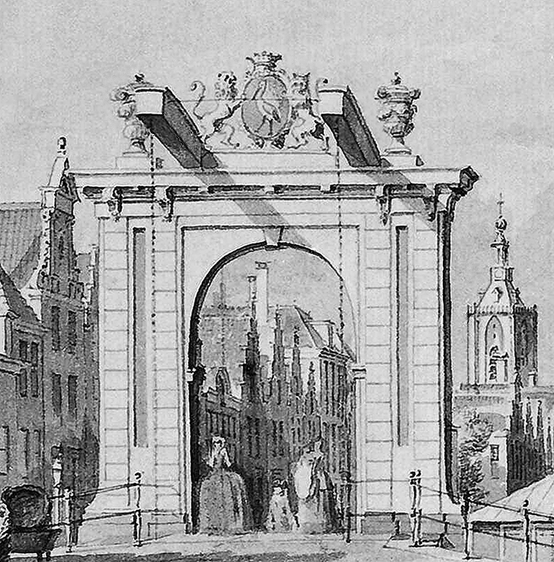 De Wagenbrug met valbrug in Den Haag, gezien vanaf de Weg naar Delft, de tegenwoordige Stationsweg.